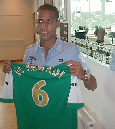 नेपाल भाषा: Karim El Ahmadi op 2 juli 2008 in het Maasgebouw te Rotterdam.